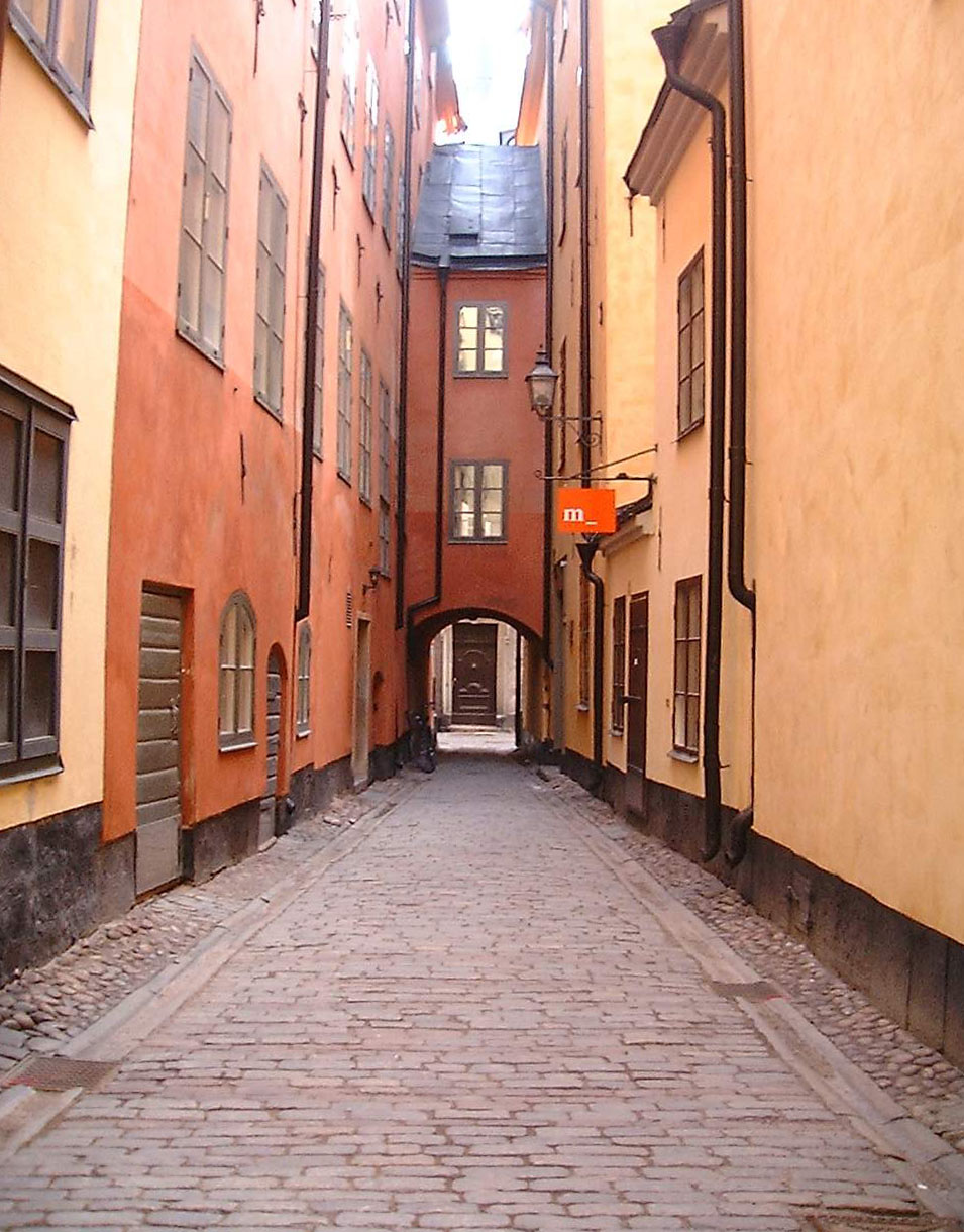 Skeppar Olofs Gränd, Gamla stan, Stockholm.